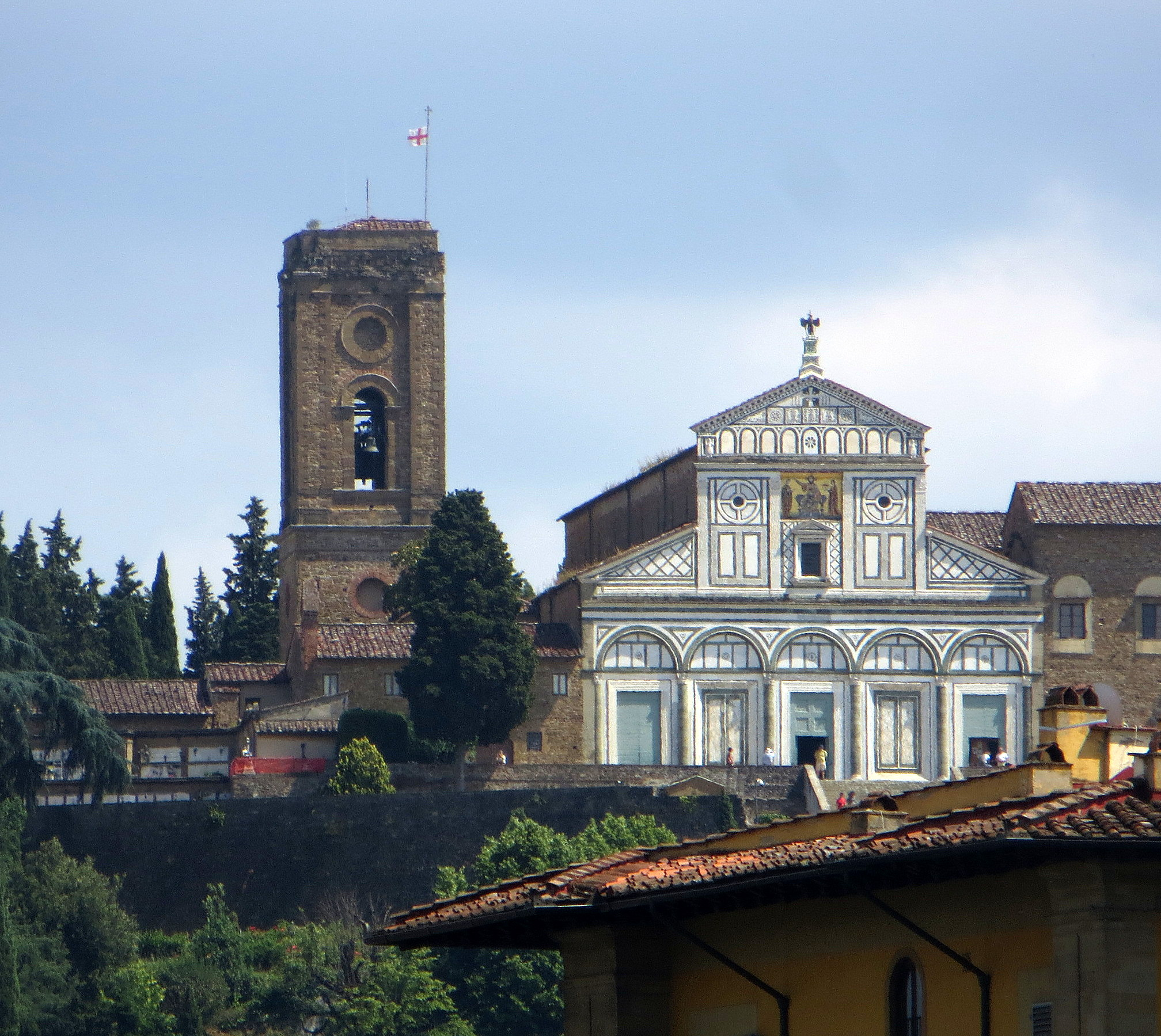 Chiesa di San Miniato a Monte dal ponte vecchio